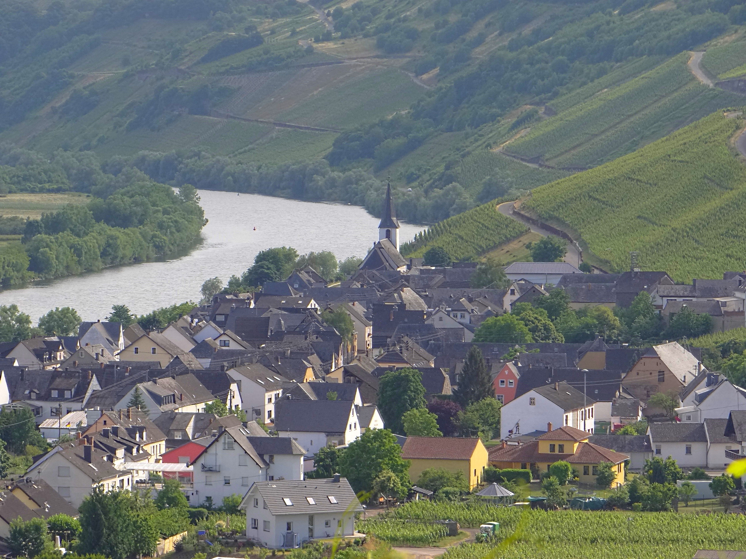 Kesten an der Mosel